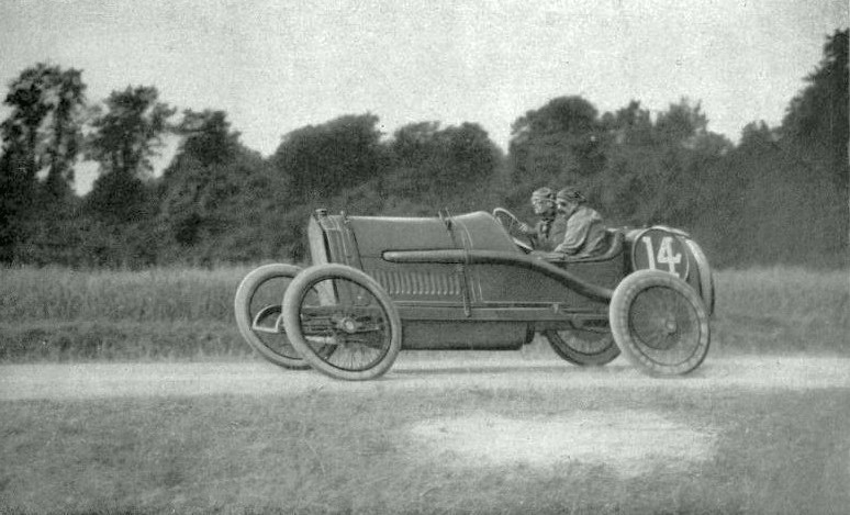 Jules Goux deuxième du Grand Prix de France à Amiens en 1913 sur Peugeot (La Vie au Grand Air du 11 juillet 1914, p.633)